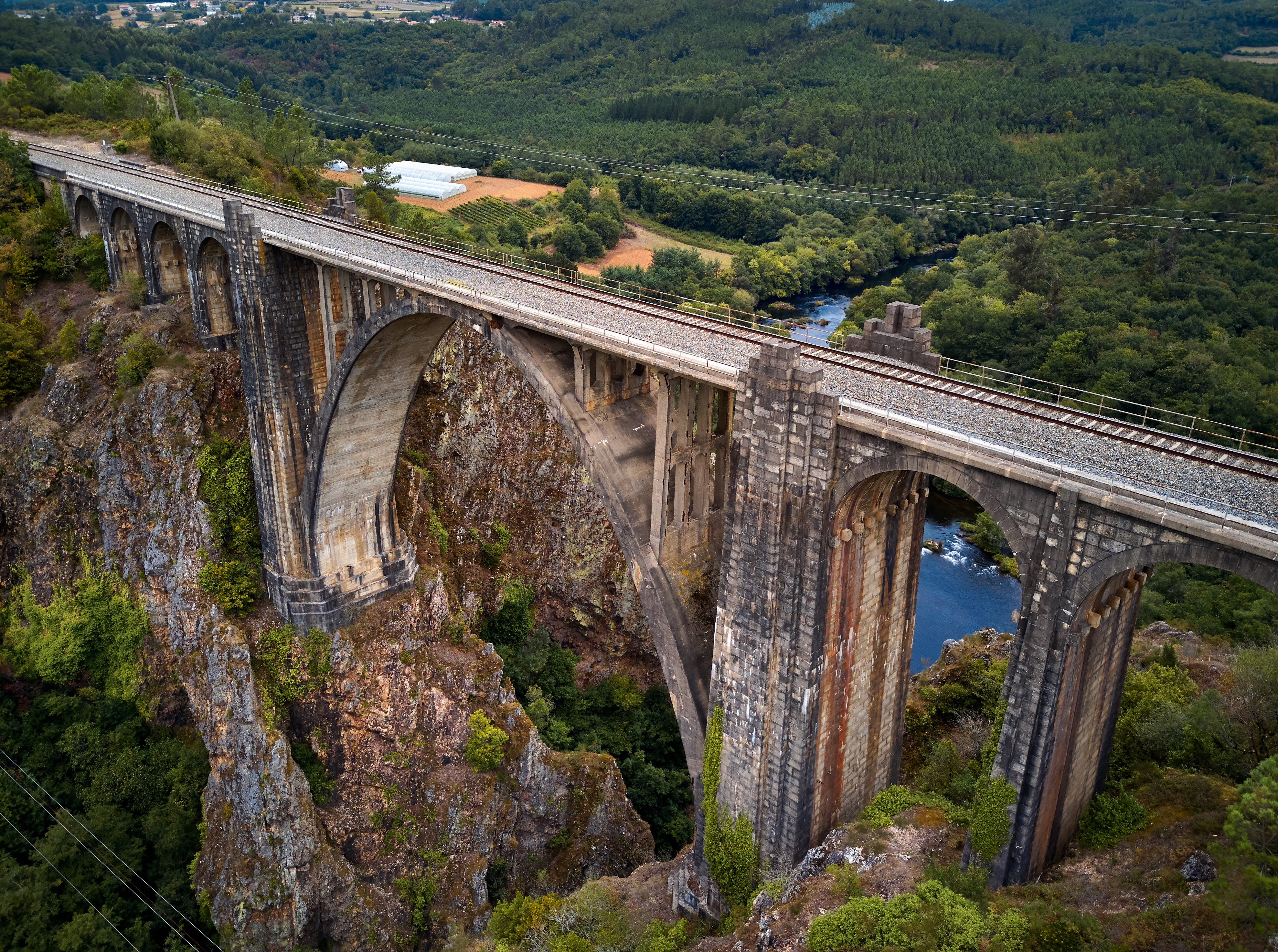 Ponte de Gundian